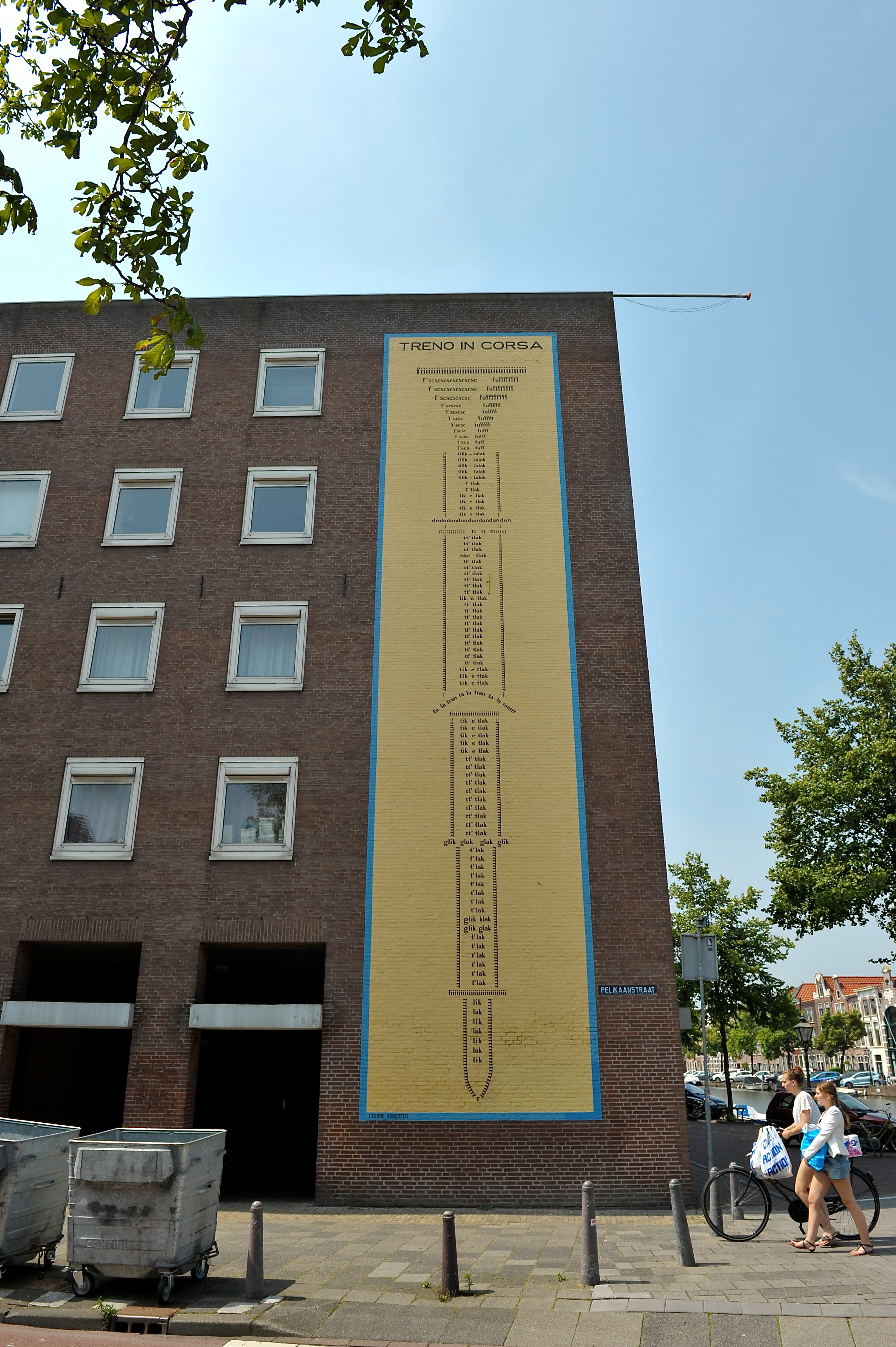 'Treno in Corsa' ('Moving Train') van Cesare Simonetti. Muurgedicht geschilderd op een muur van de Pelikaanhof in de Pelikaanstraat. In 'Treno in Corsa' verbeeldt de Italiaan Cesare Simonetti een treinreis over het eiland Corsica met klanknabootsingen. Bron